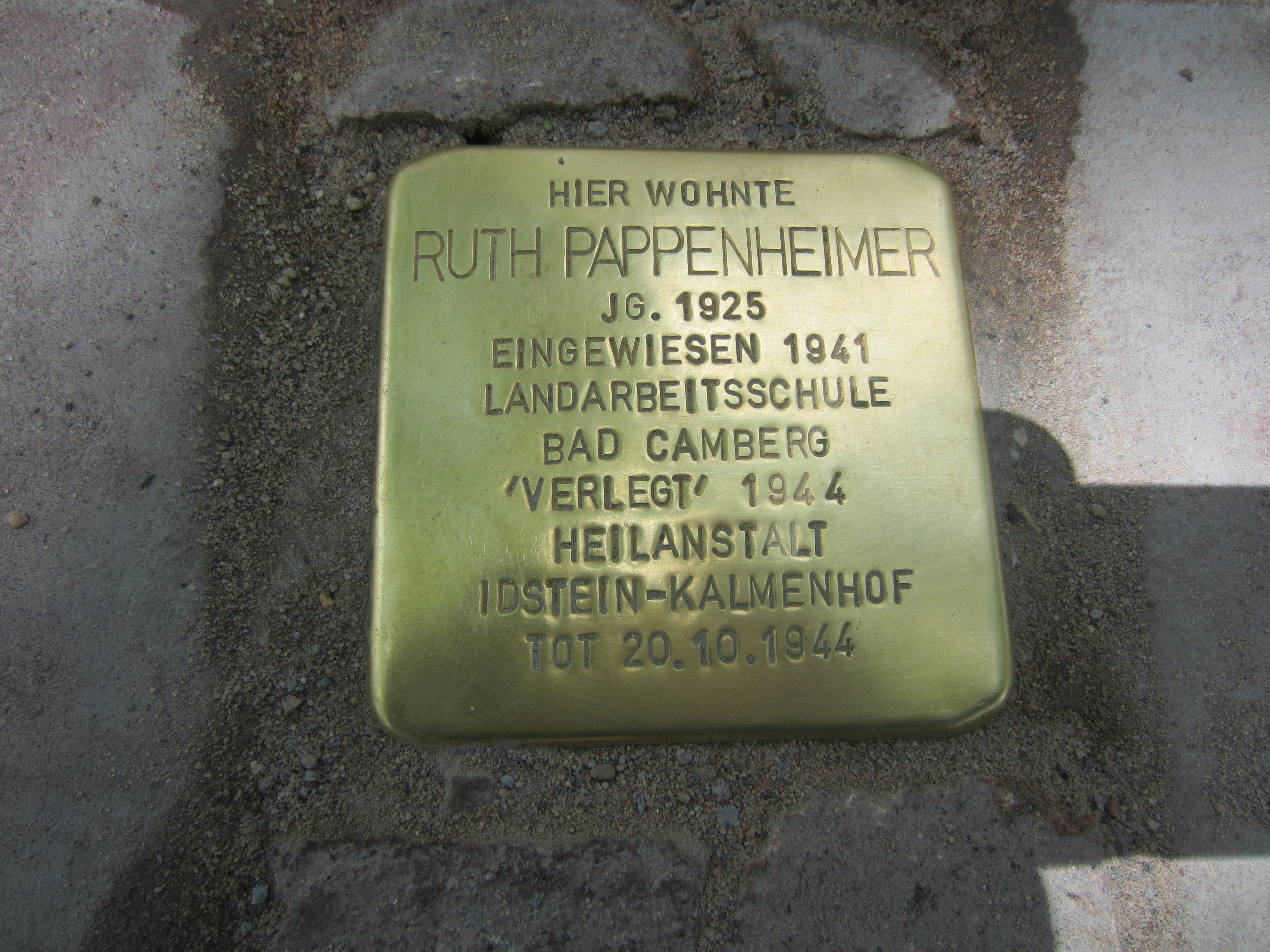 Stumbling Stone Ruth Pappenheimer